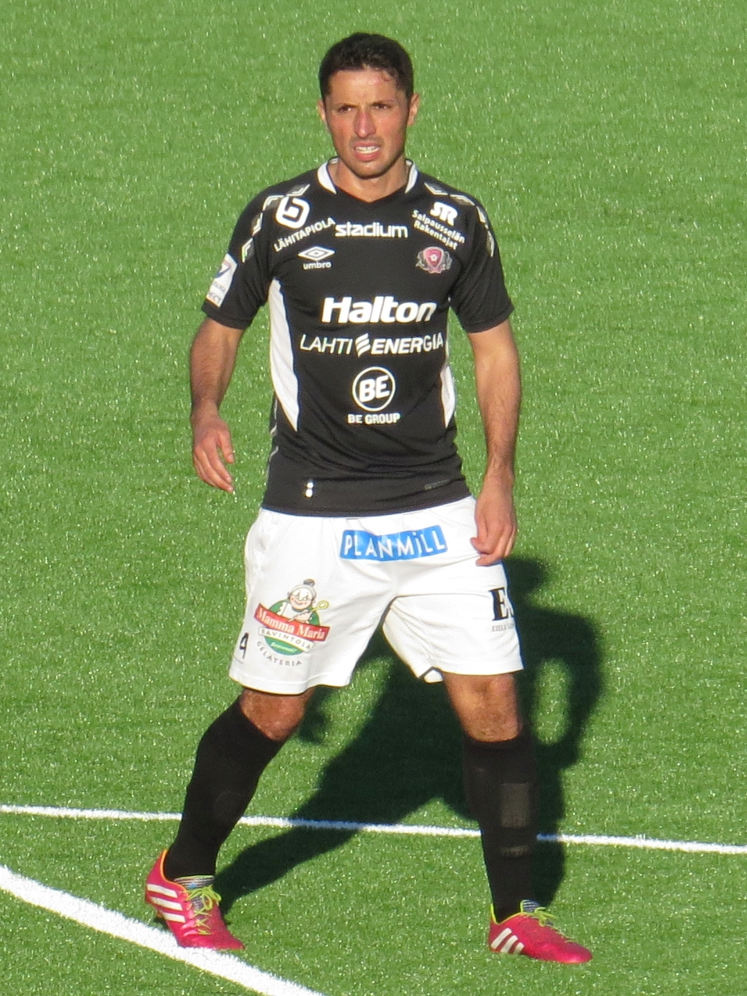 Xhevdet Gela, kosovolais-suomalainen jalkapalloilija FC Lahden joukkueessa kaudella 2015.